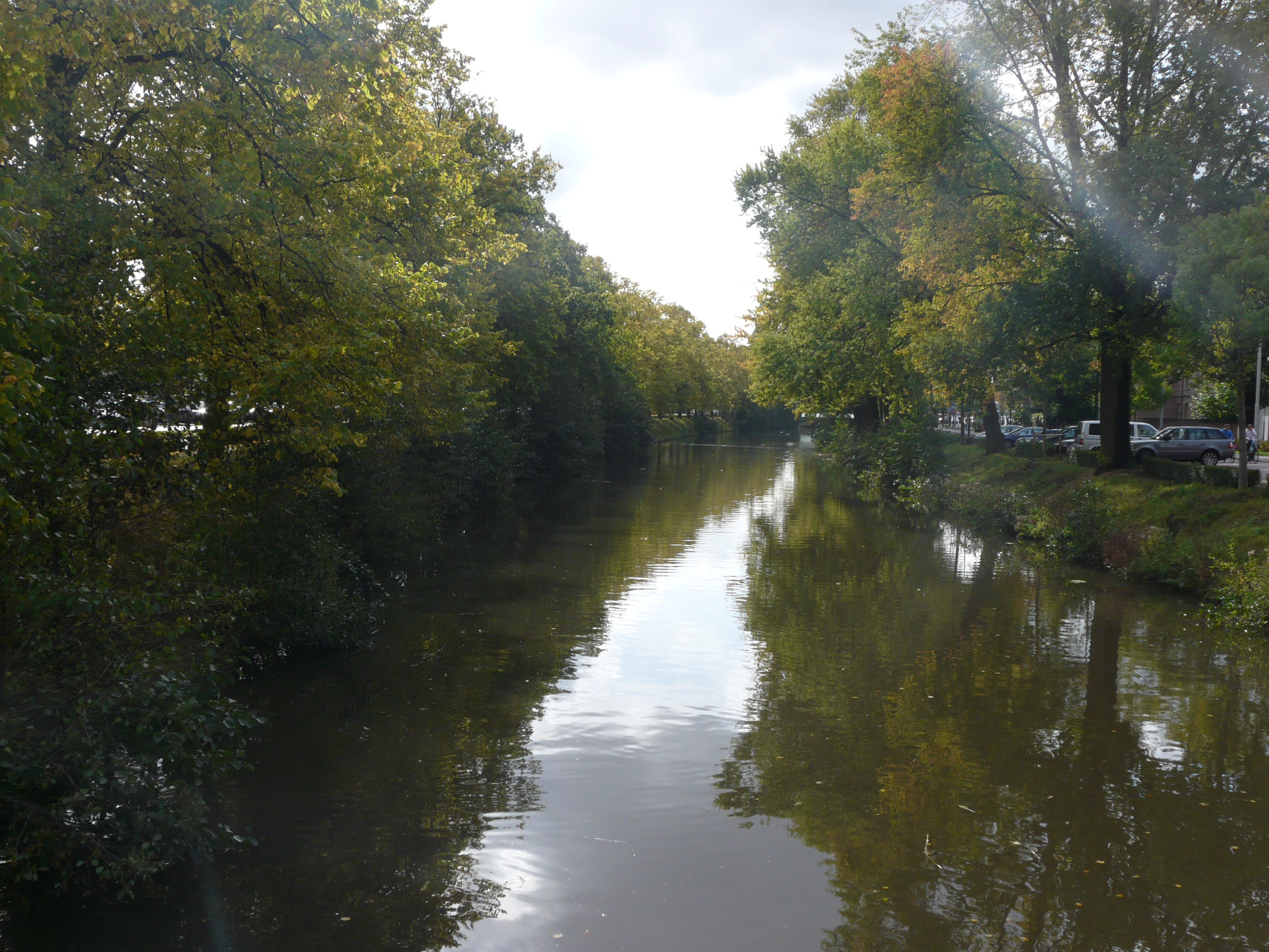 Wilhelminasingel in Breda